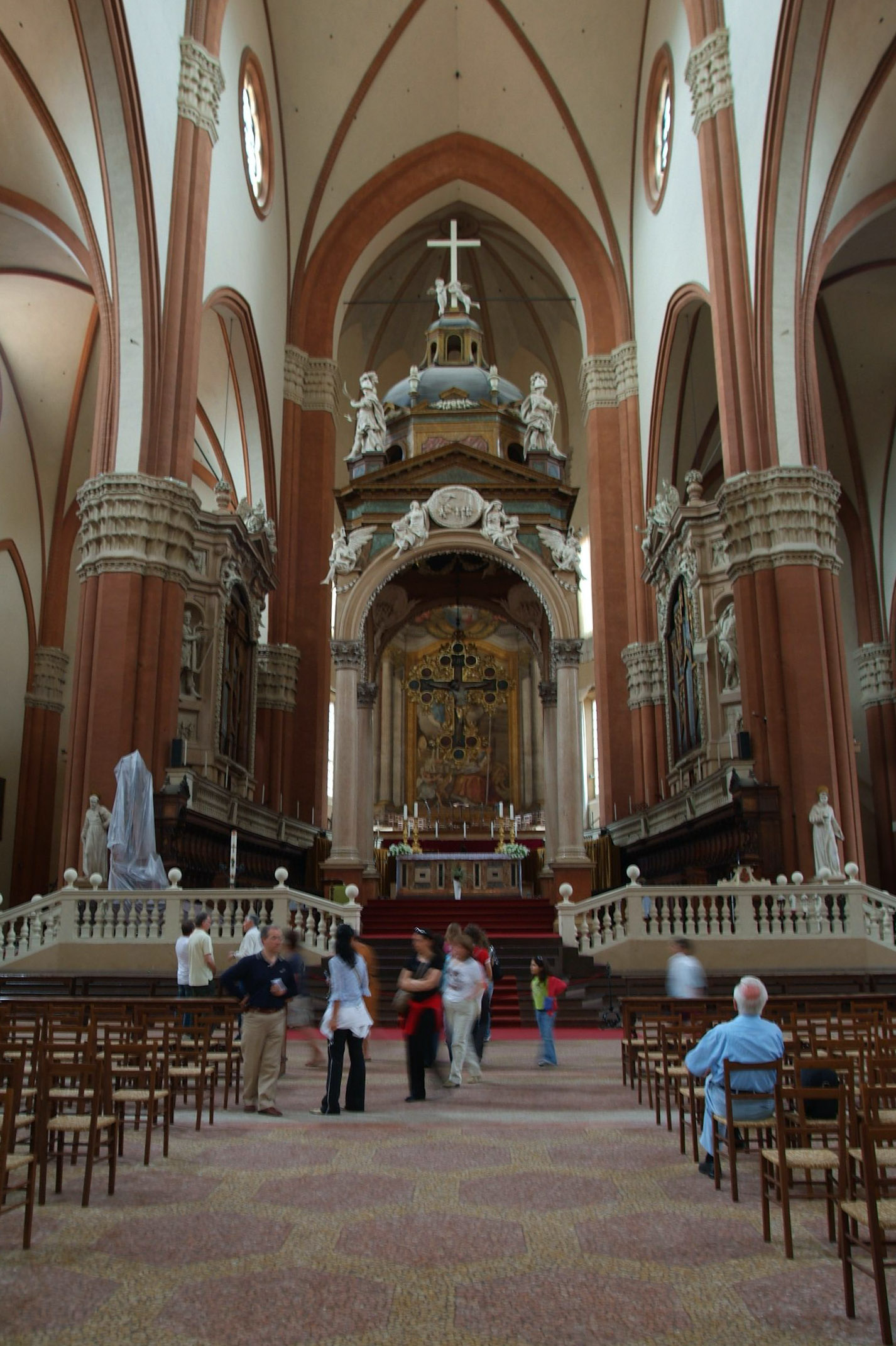 San Petronio